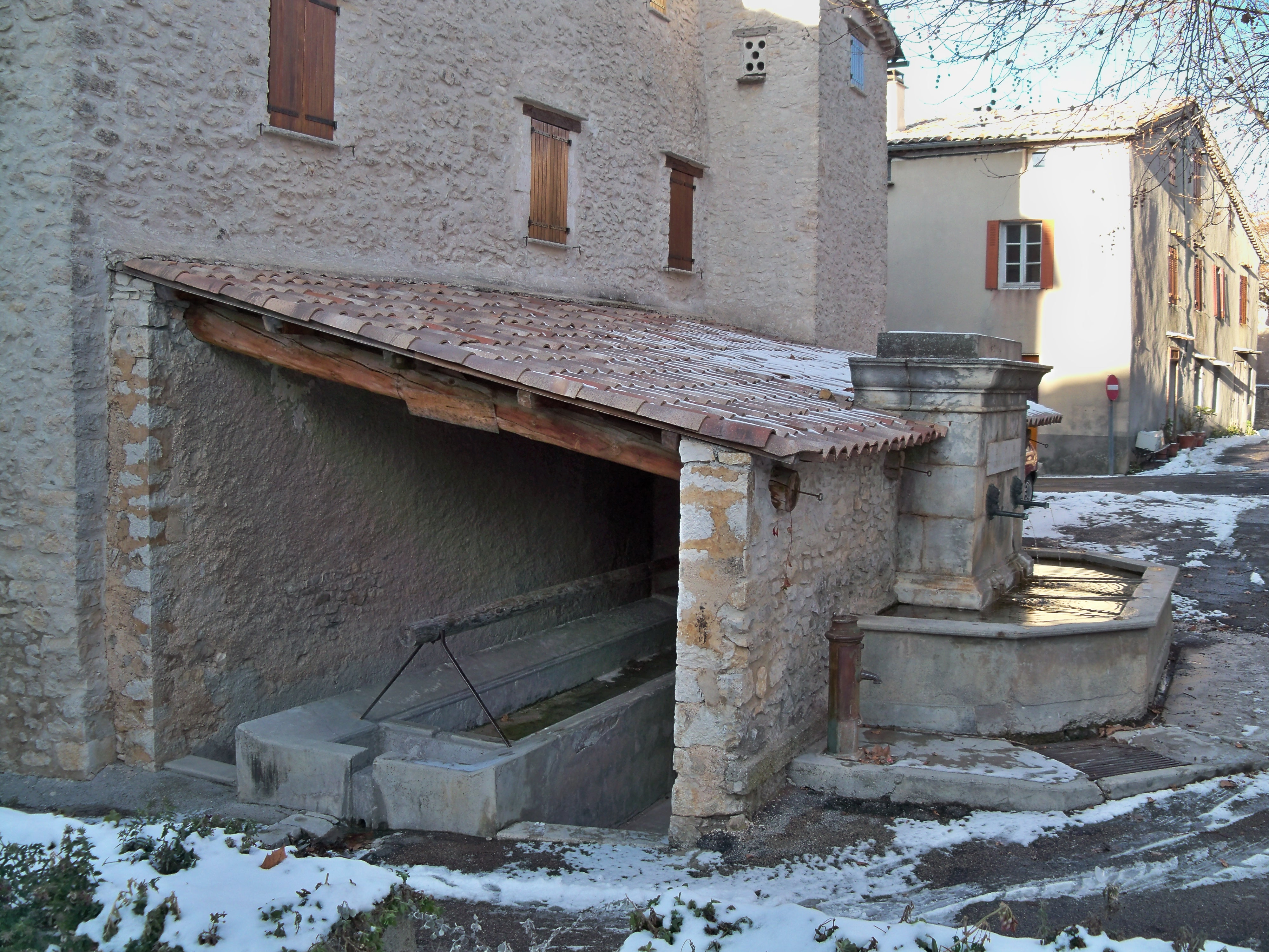 Lavoir et fontaine publique à Revest-du-Bion (04)